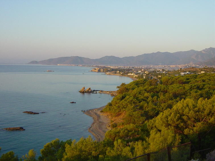 Anamur von Osten